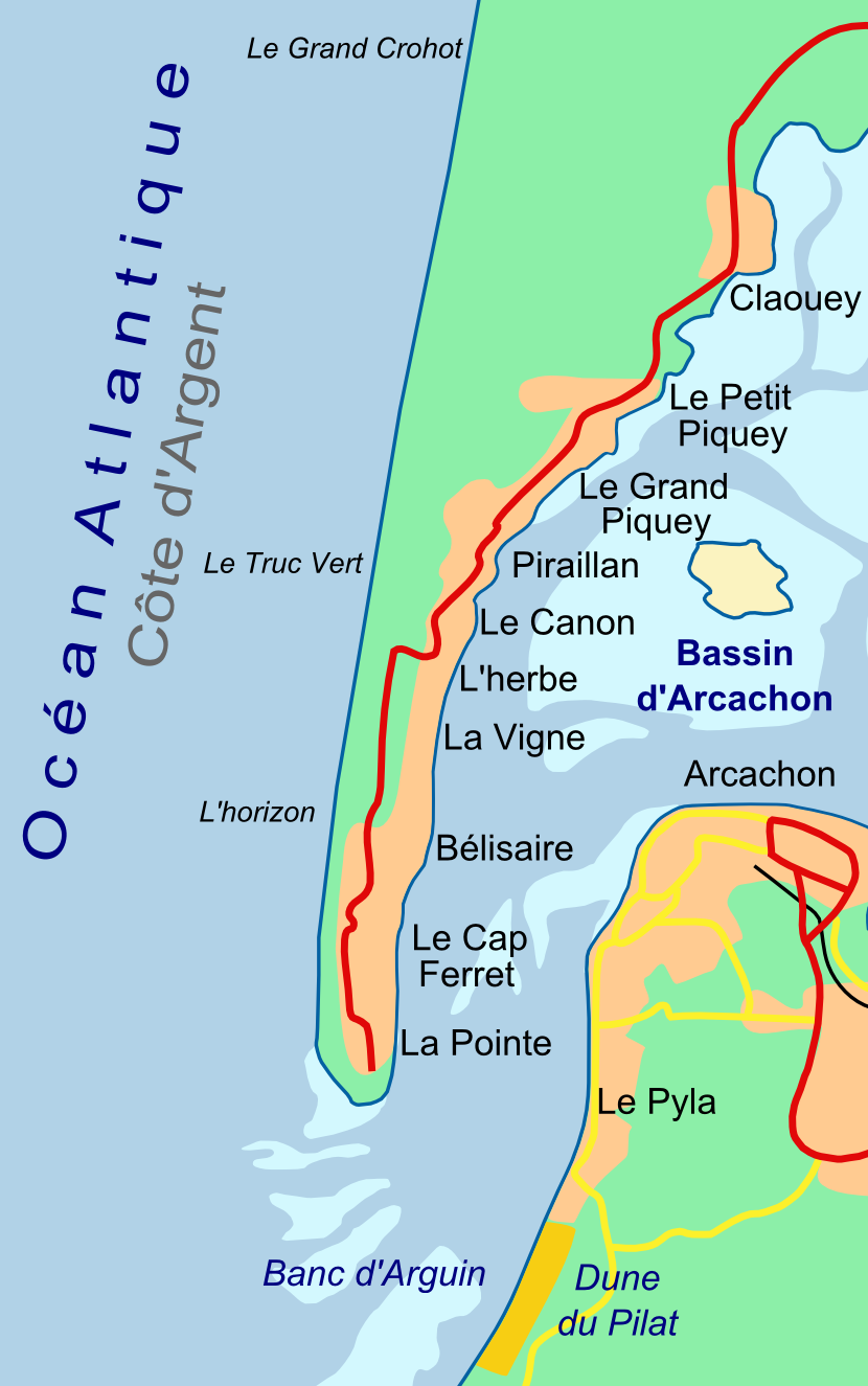 Carte de la presqu'île du Cap ferret (Gironde, Aquitaine, France)